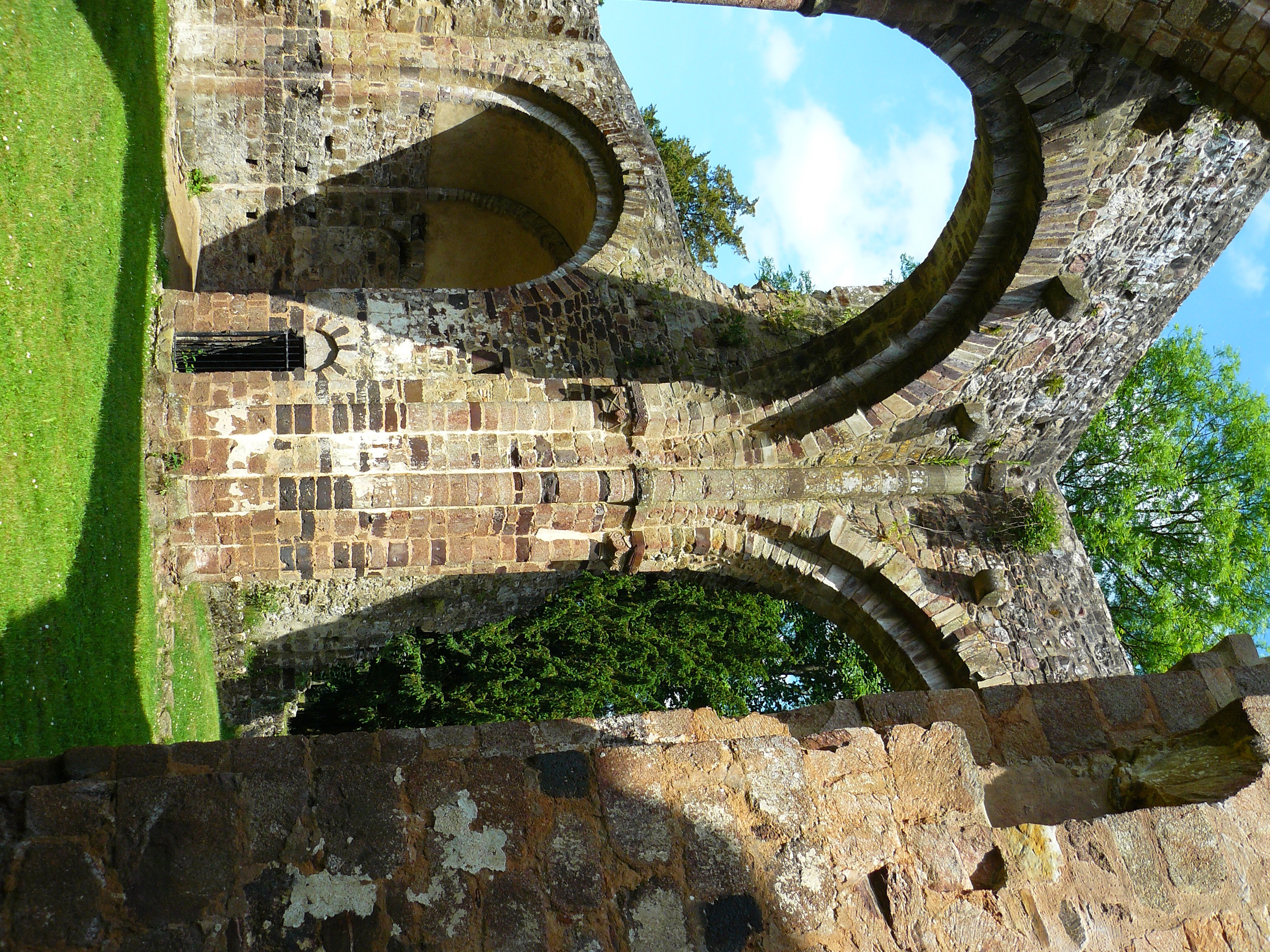 chœur et (en arrière-plan) croisillon nord et absidiole nord de l'abbatiale xiie siècle de l'abbaye double Notre-Dame du Nid-au-Merle (ou abbaye Saint-Sulpice de la Forêt), à Saint-Sulpice-la-Forêt, à 15 km au nord de Rennes (Bretagne).